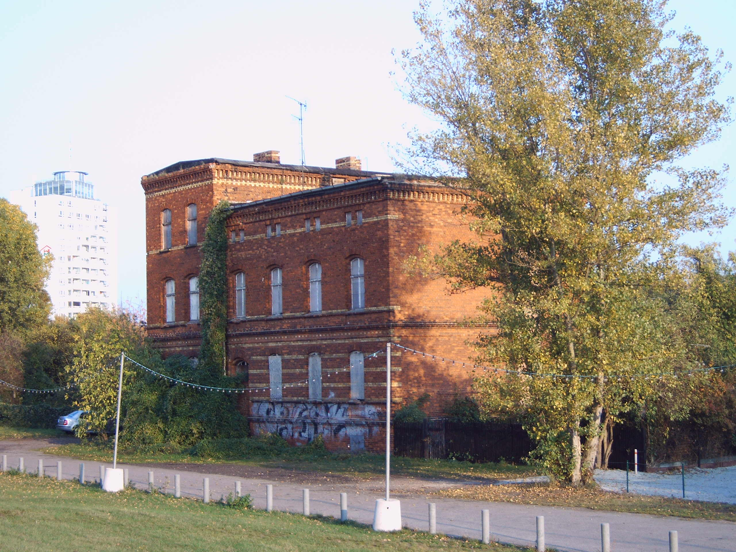 Gebäude aus der Zeit der Zitadelle Magdeburg